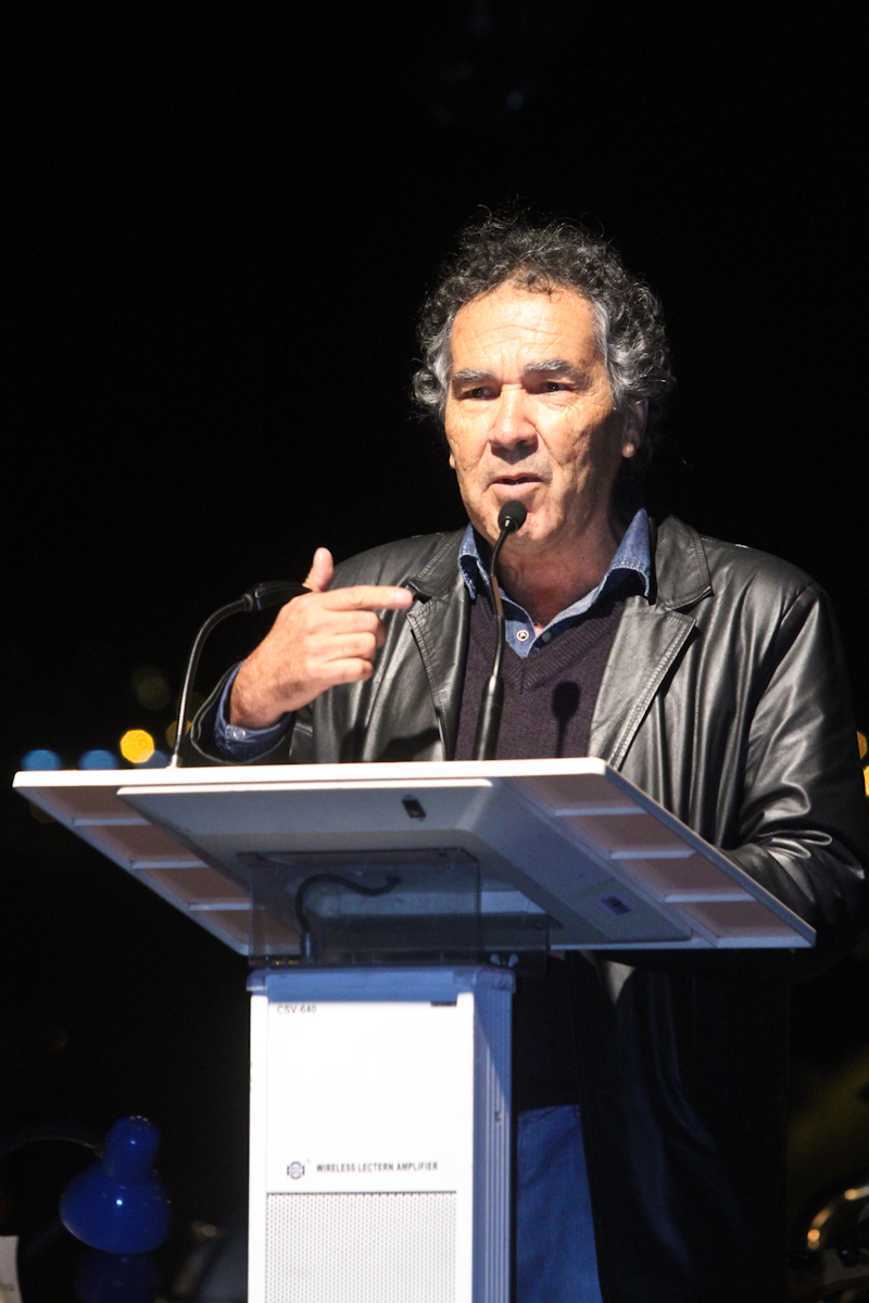 Hernán Rivera Letelier, escritor chileno, en el Festival Internacional del Libro Zicosur de Antofagasta 2012.